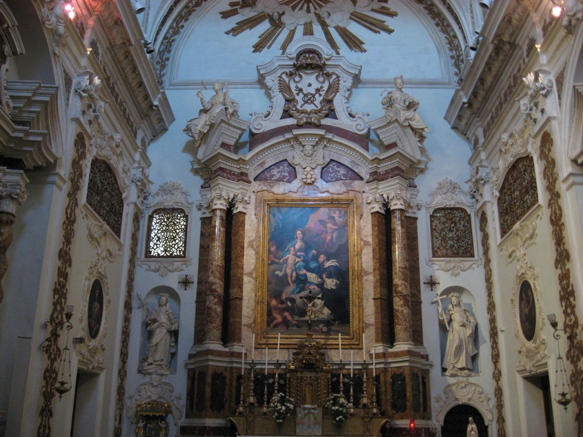 Cagli, Chiesa di San Nicolò, Altar maggiore